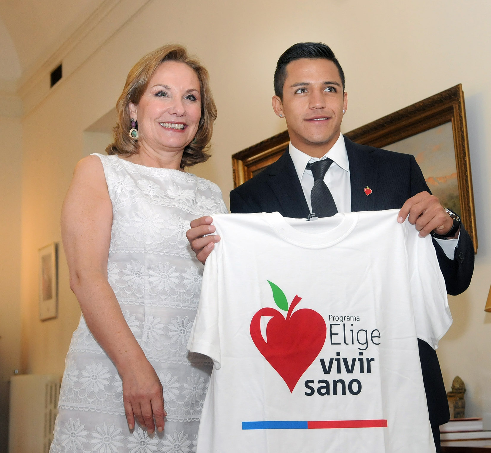 Alexis Sánchez, futbolista chileno.